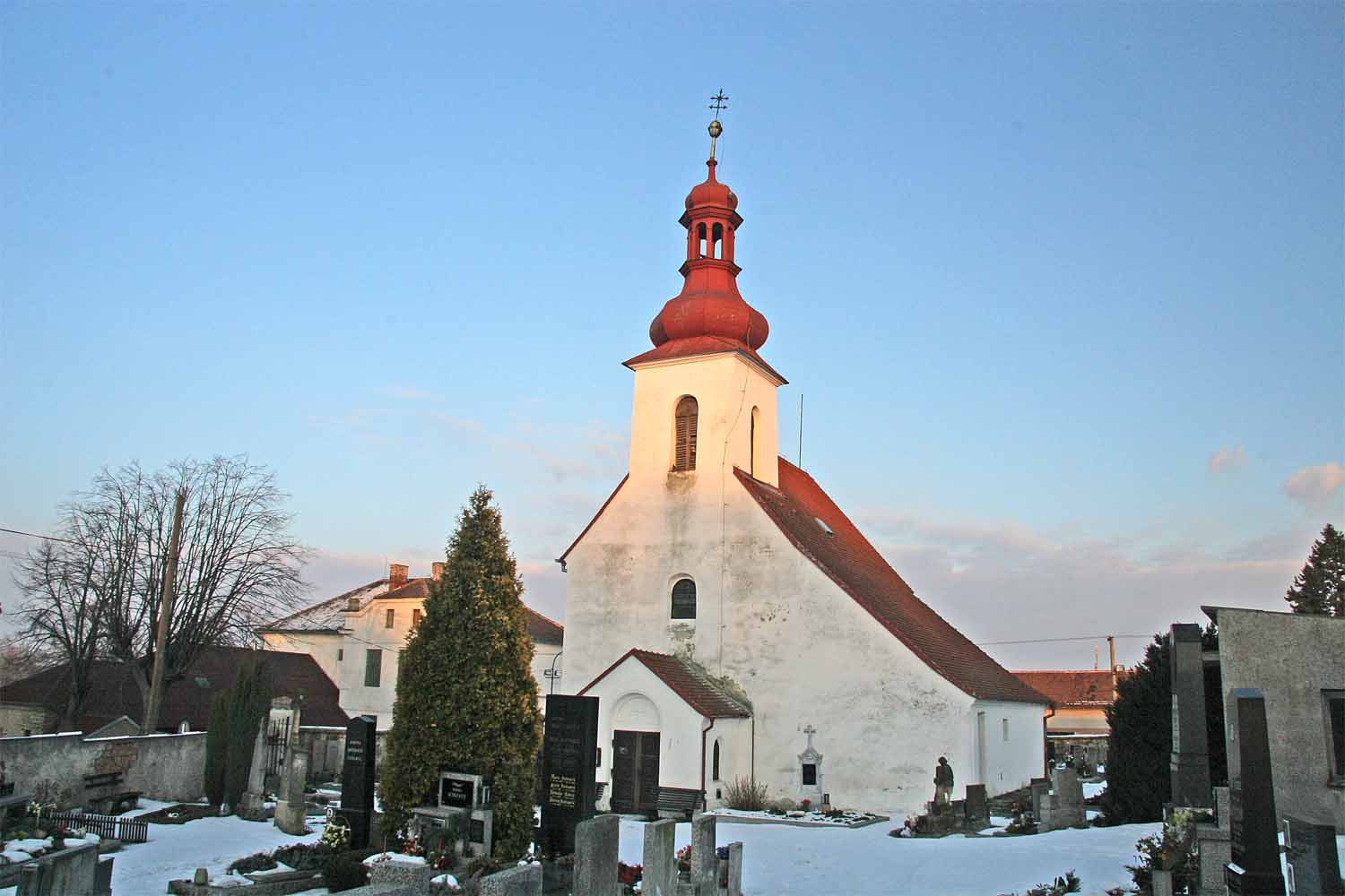 Románský kostel Sv. Petra a Pavla v Kojicích